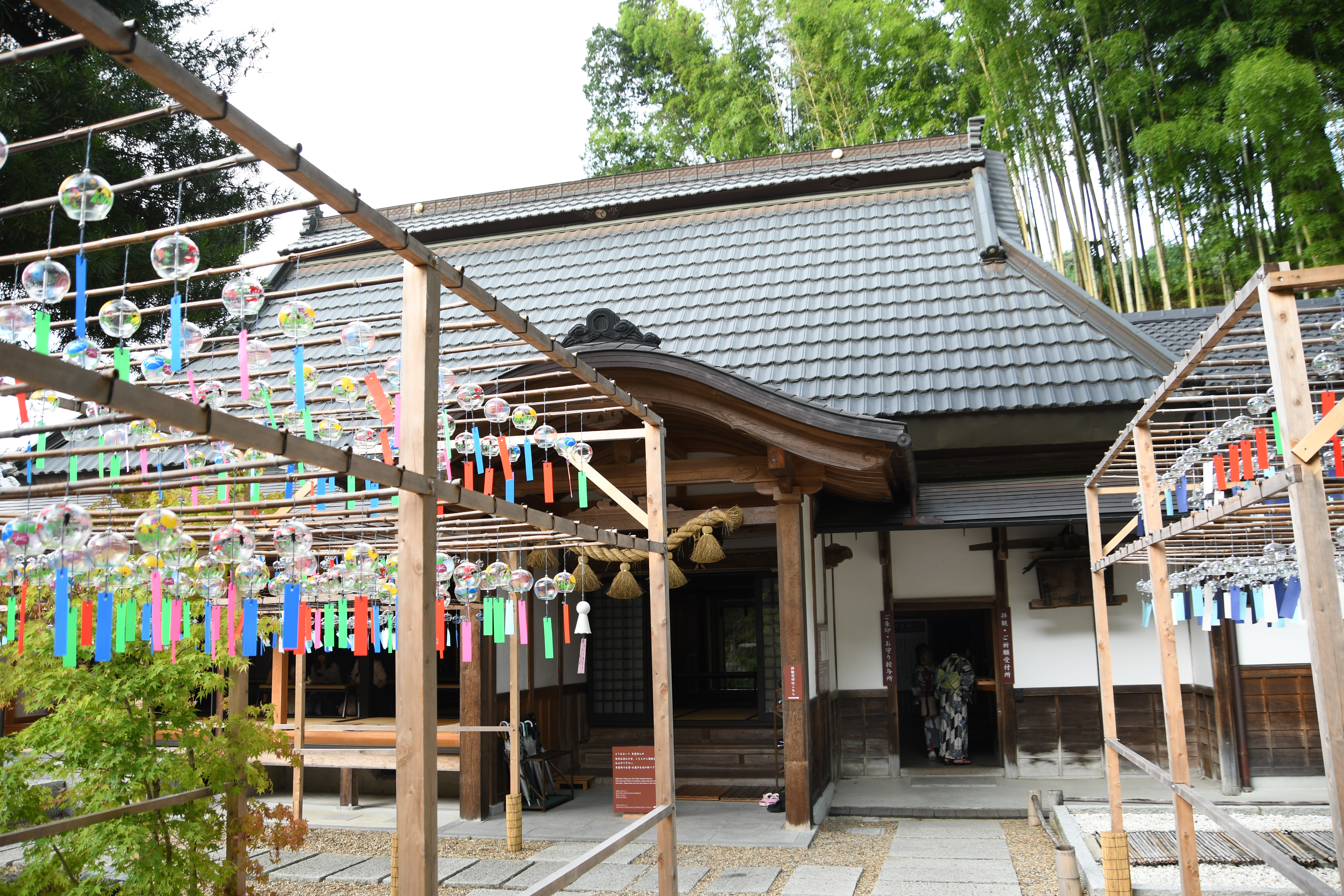 京都府宇治田原町奥山田 正寿院 本殿。2018年8月11日撮影。